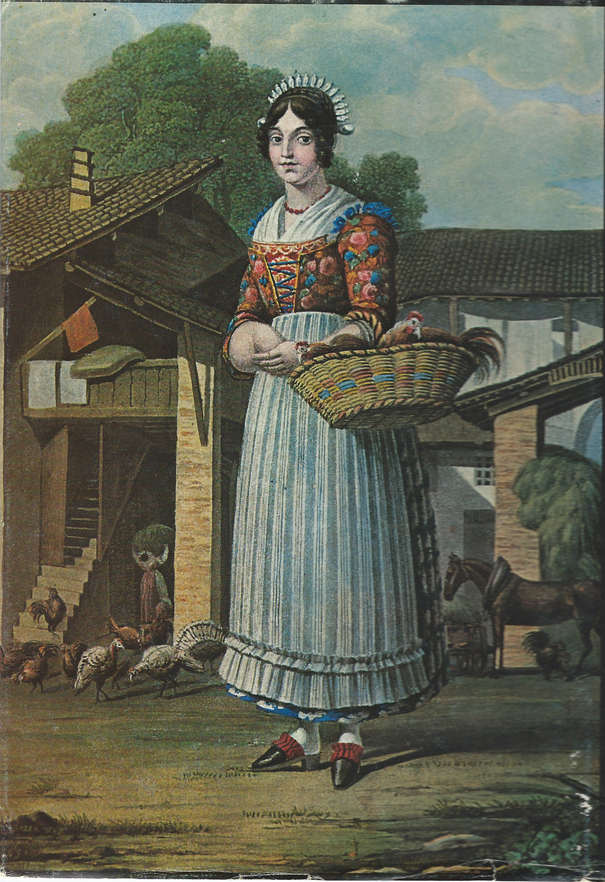 Vecchio dipinto secolo XVIII o inizio XIX di una corte brianzola e donna agghindata a festa